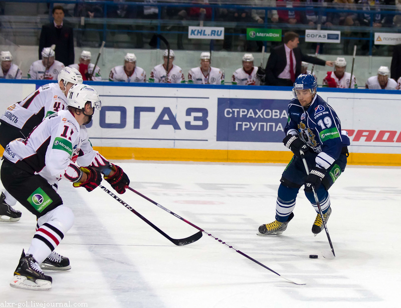 Евгений Коротков (№19) против Дмитрия Рябыкина (№11) и Мартина Шкоулы (№41) в матче КХЛ «Амур» — «Авангард» 19 октября 2011 года